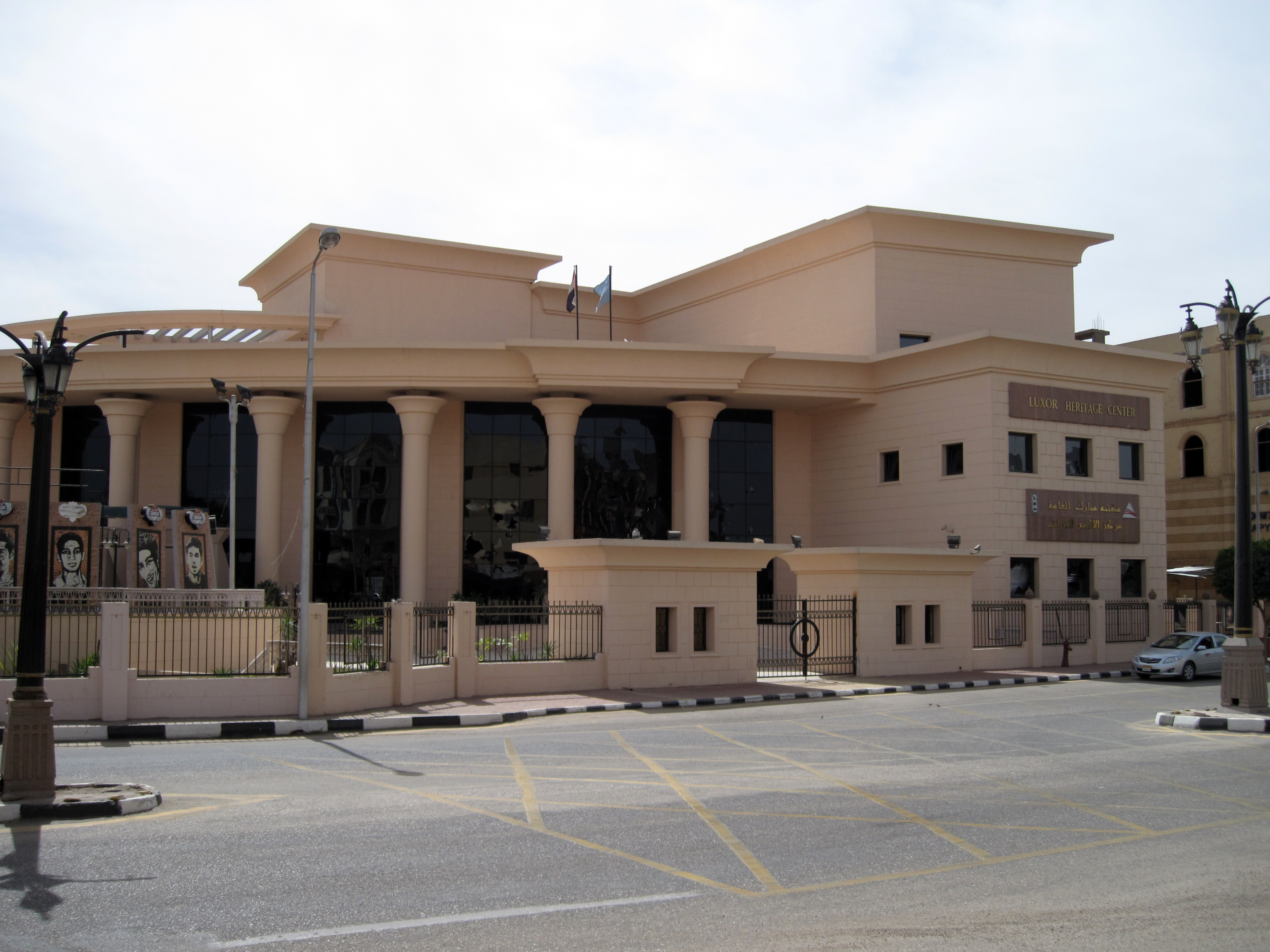 Luxor Heritage Center in Luxor, Ägypten